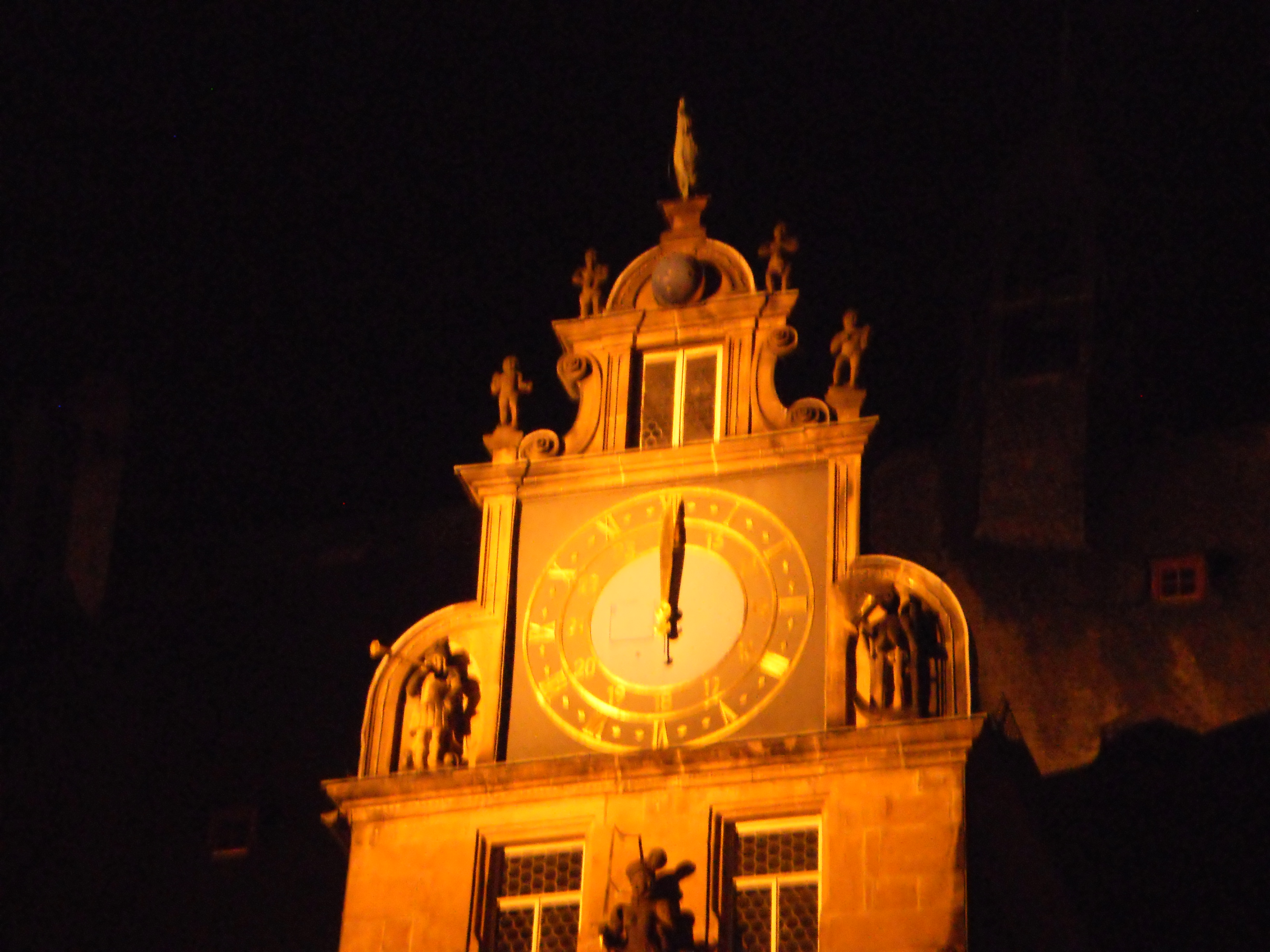 Marburger Rathaus mit der Rathausuhr um Mitternacht. Foto am 20. Juli 2016.